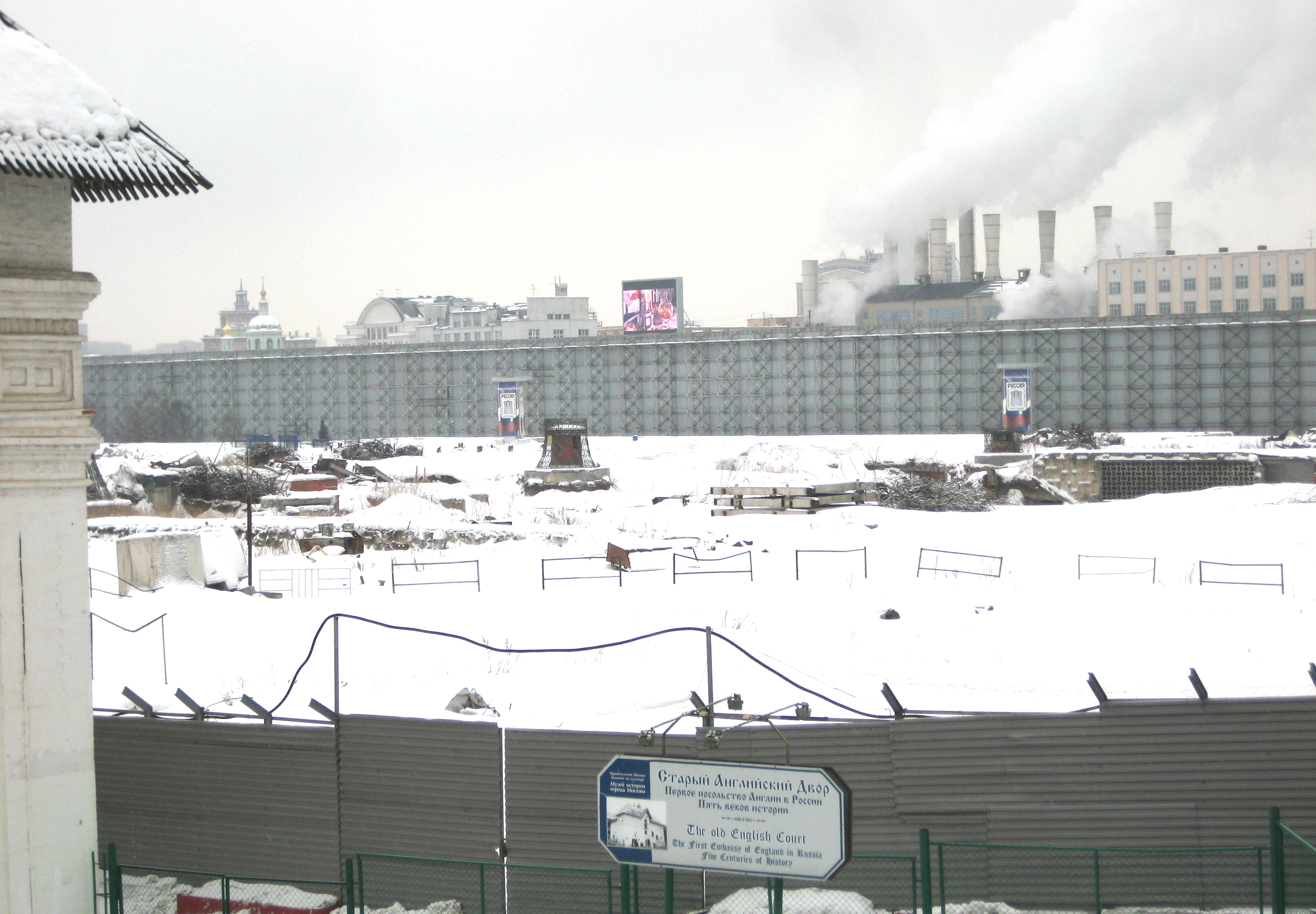 Пустырь на месте снесенной гостиницы "Россия". Вид со стороны ул. Варварка. 2012